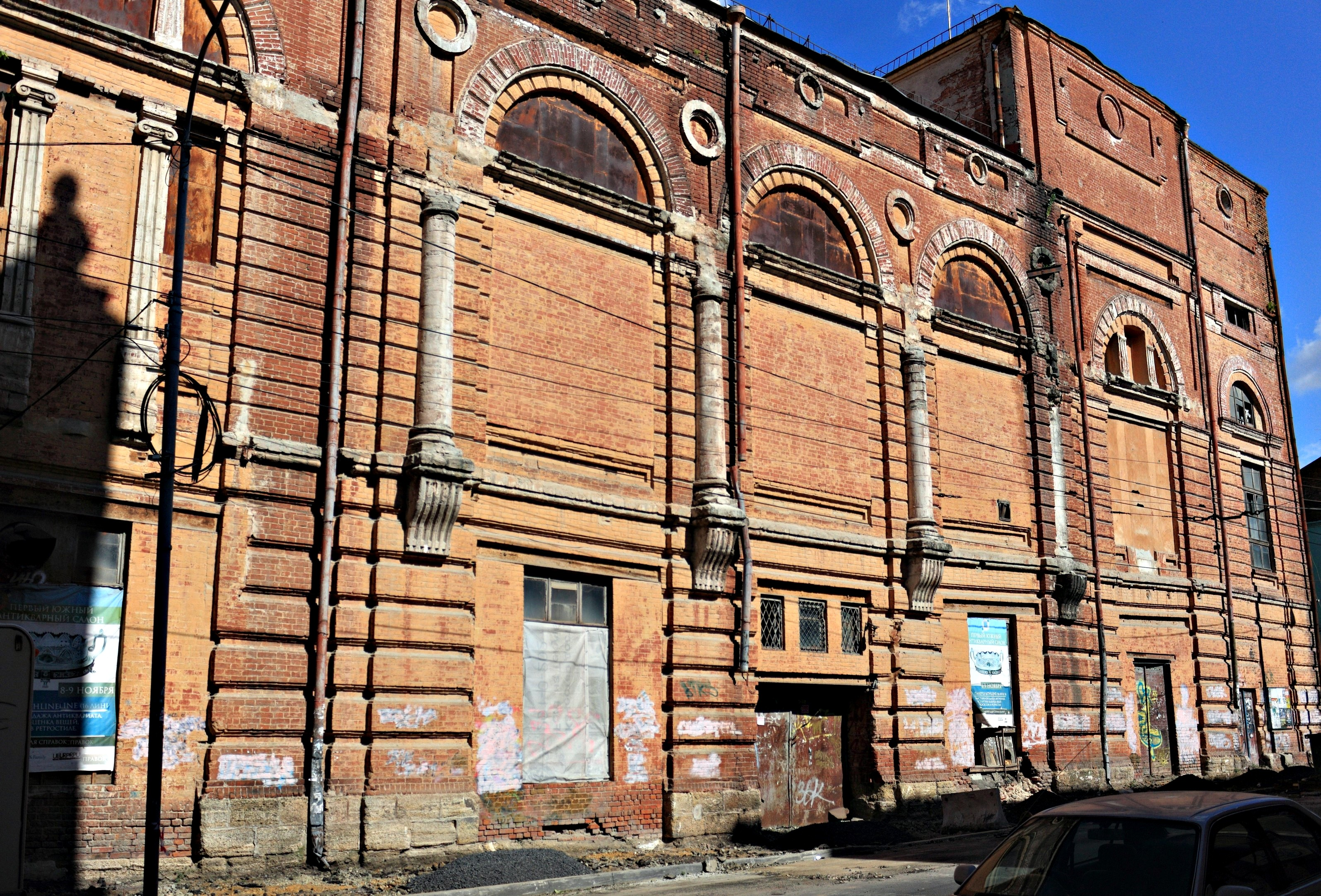 Клуб приказчиков (Дом, в котором проходил I съезд Советов Донской Советской республики): улица Серафимовича, 88, Ростов-на-Дону, Ростовская область